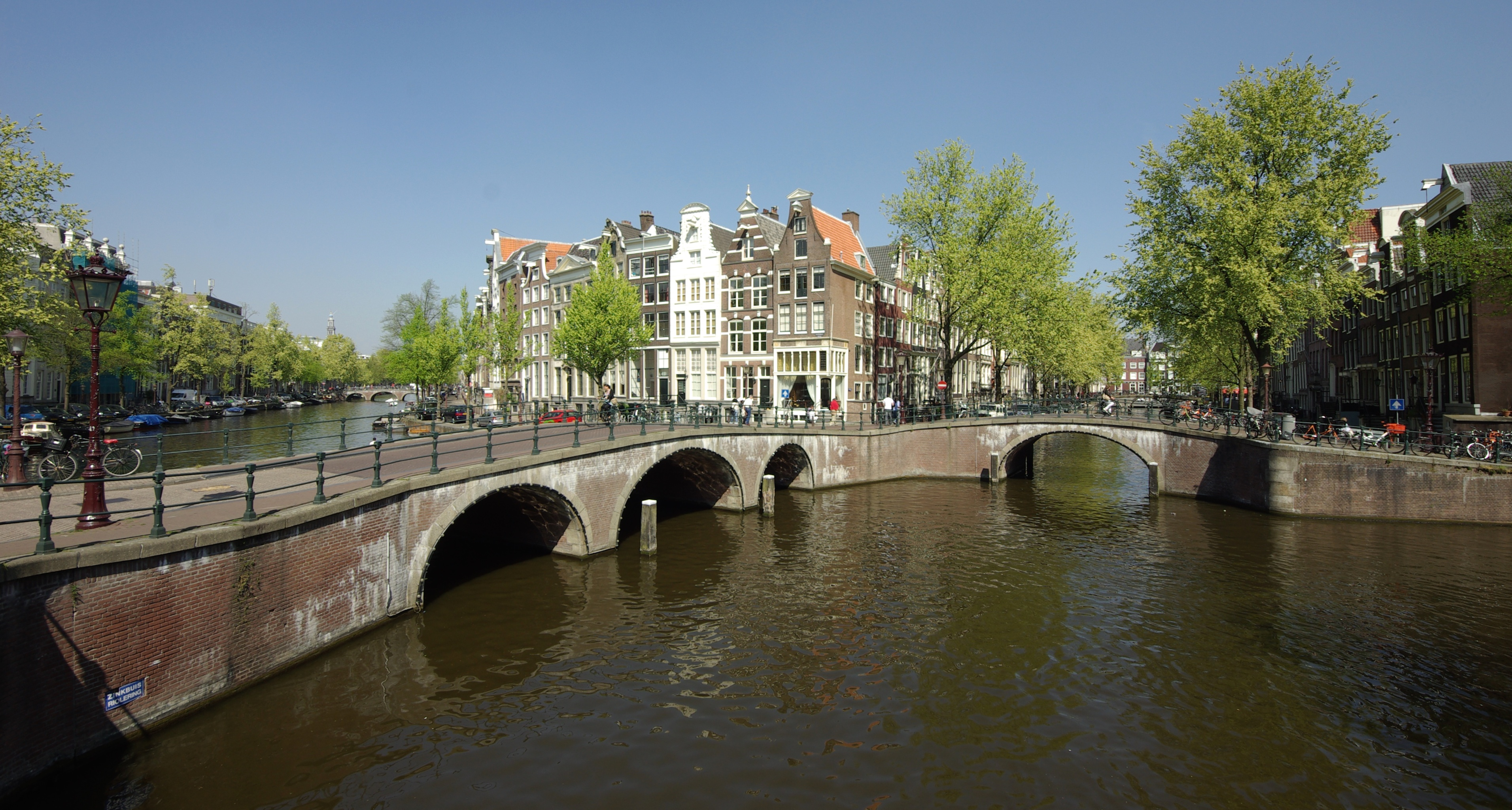 Hoek Keizersgracht (links) en Leidsegracht in Amsterdam, brug 46 links (drie doorvaarten), brug 45 midden (een doorvaart)